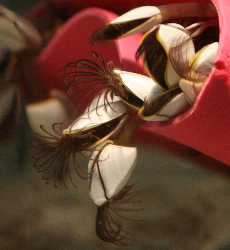 Entenmuscheln im EcoMare (Texel, NL)